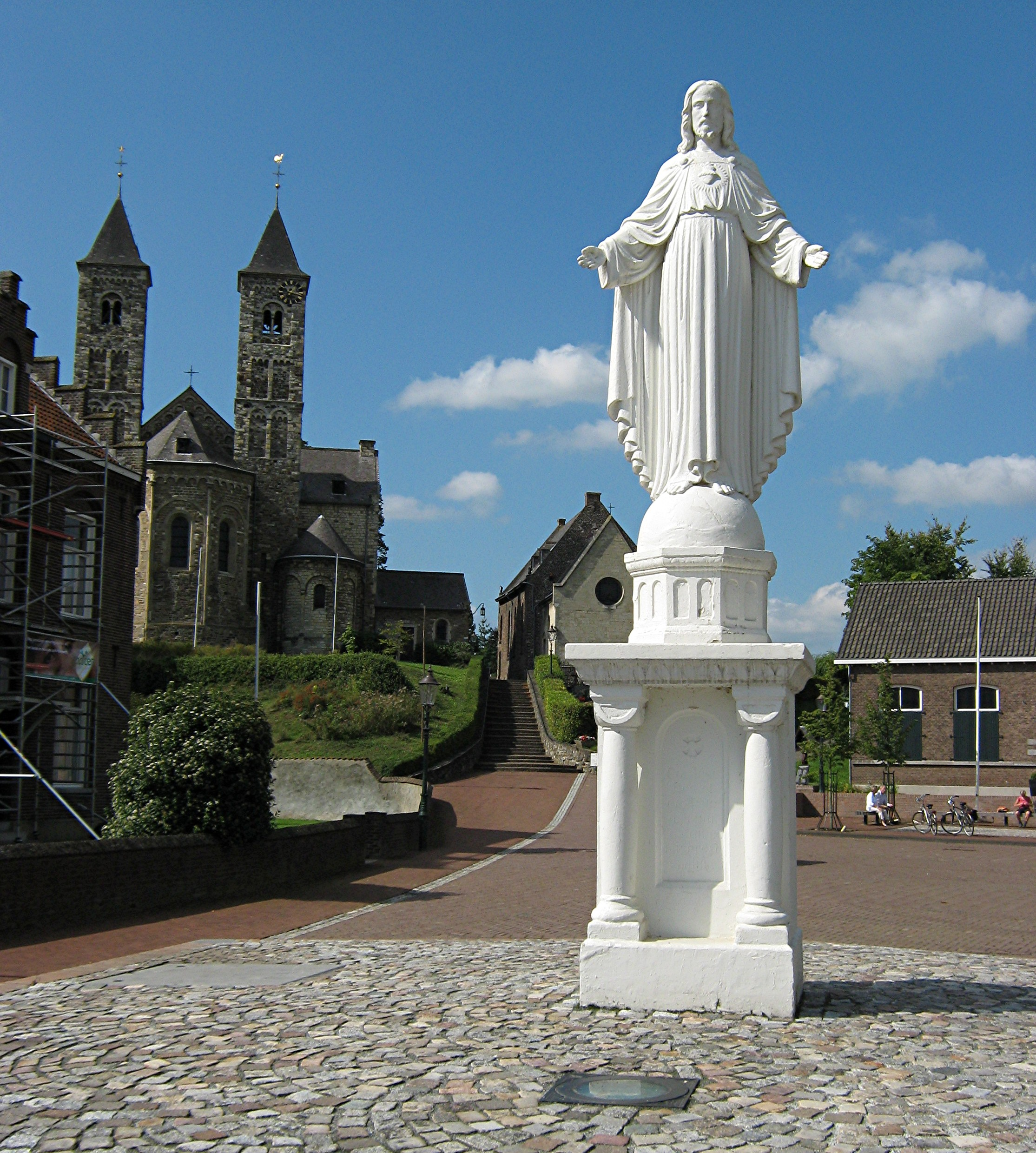 Jesusstatue auf dem Platz vor der Basilika in St. Odiliënberg